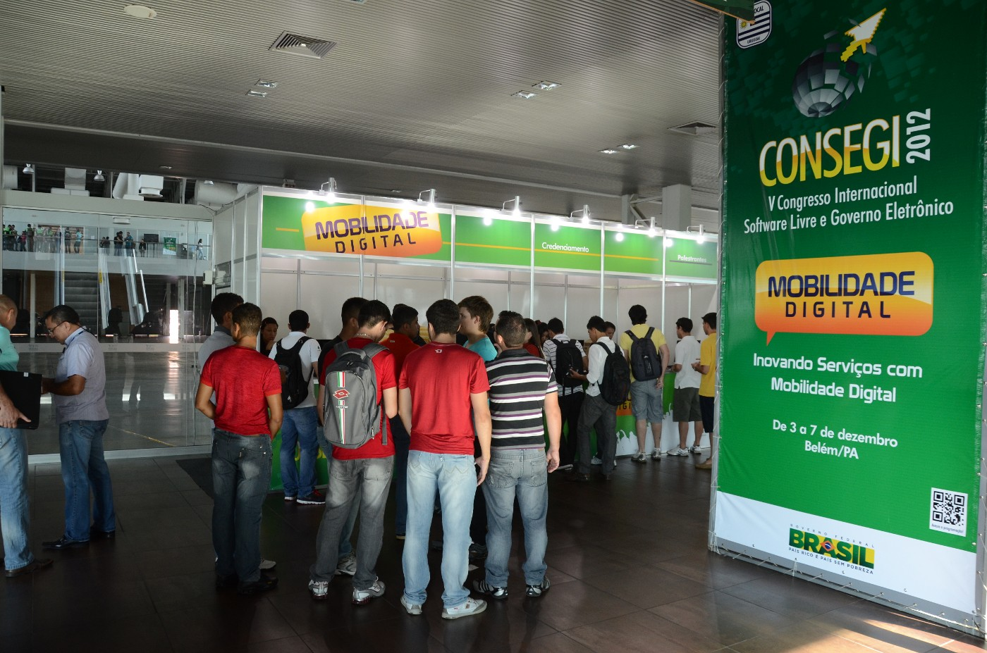 Área de inscripción y entrega de materiales del CONSEGI 2012